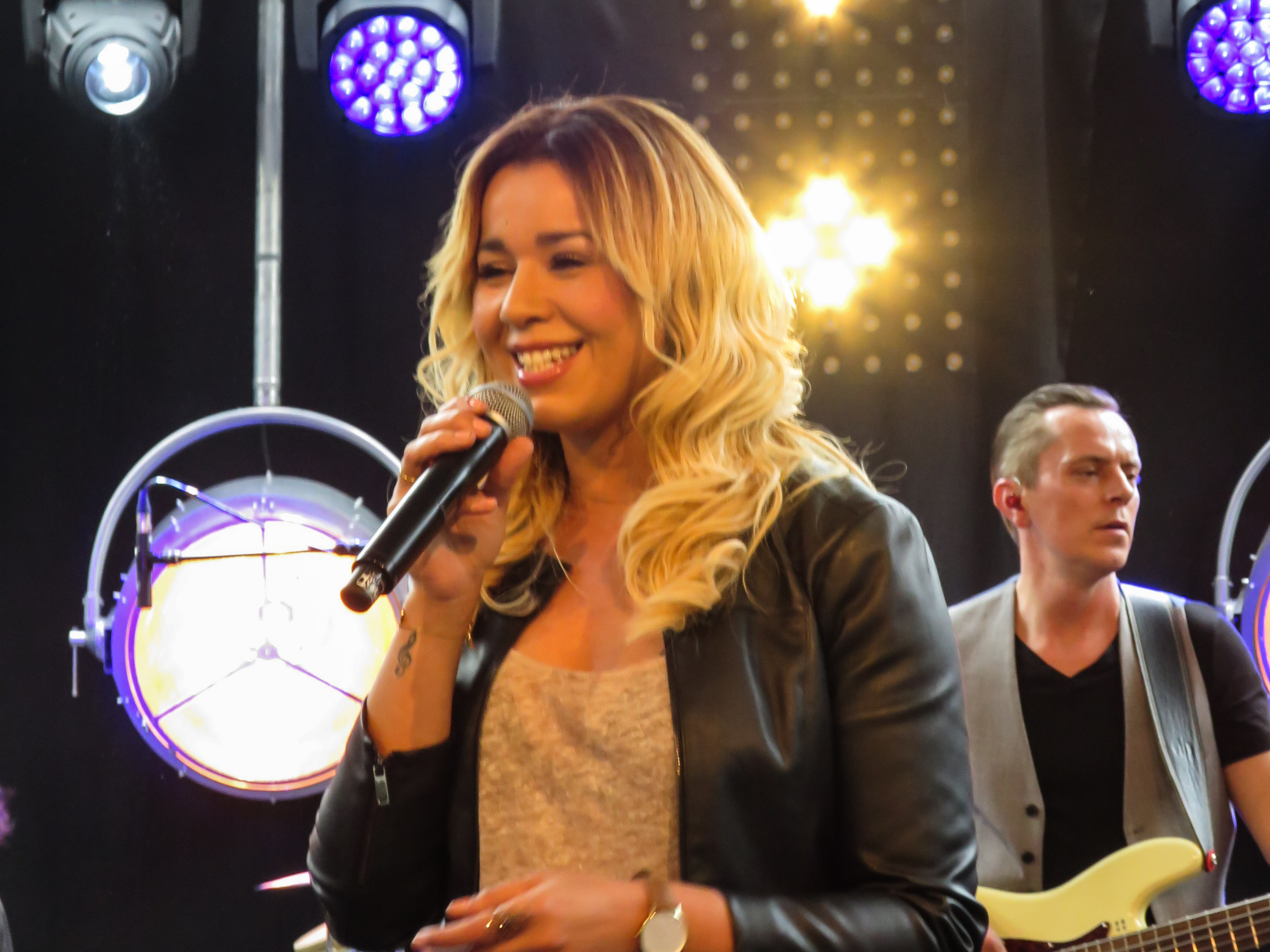 Chimène Badi en concert au centre commercial de Villabé A6 le 11 juin 2016 (Villabé, Essonne, France)